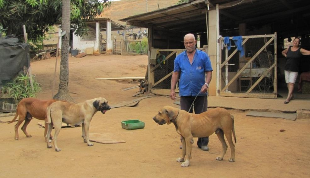 Originais Filas Brasileiros recentes em fazenda